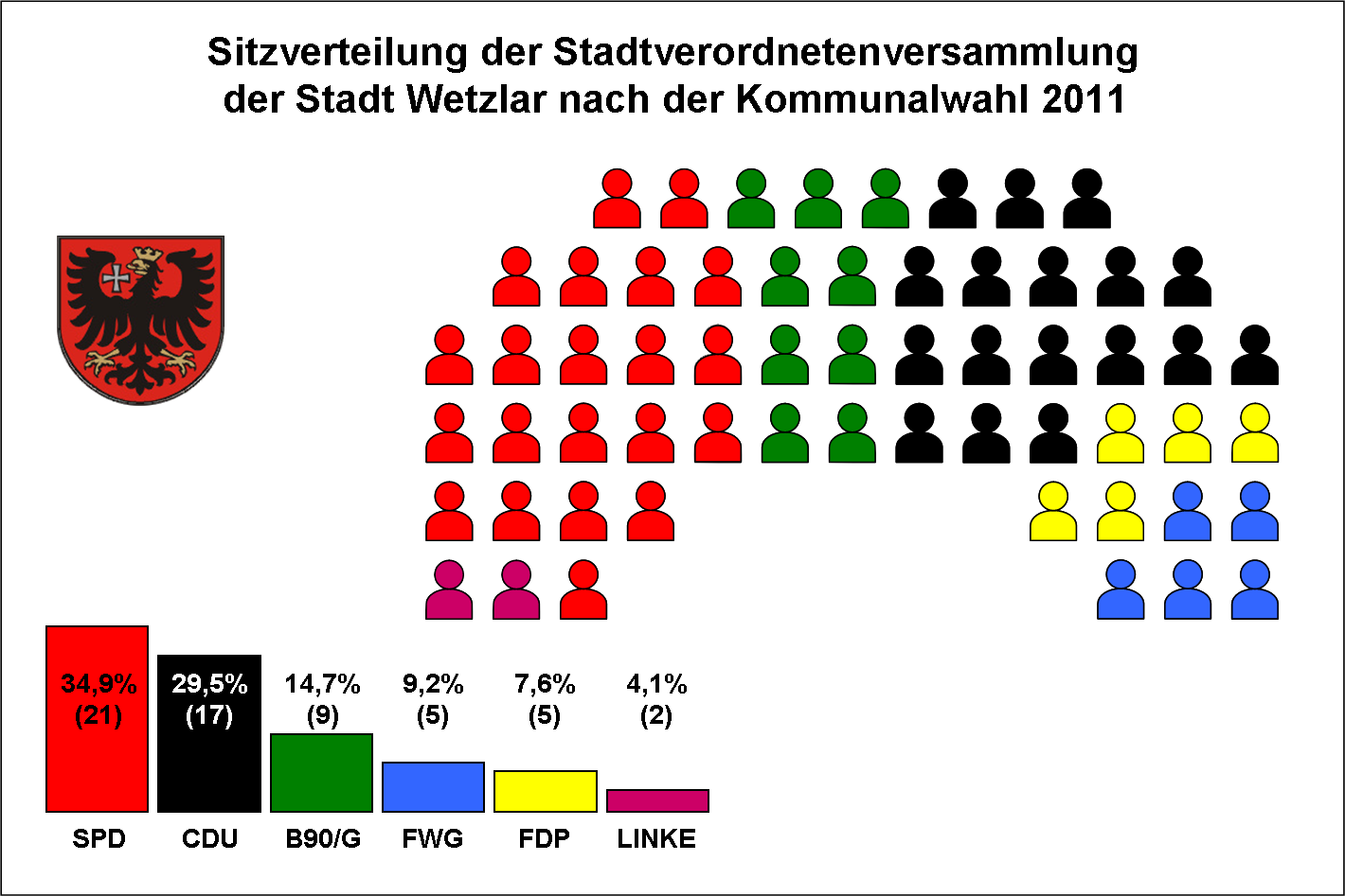 Sitzverteilung der Stadtverordnetenversammlung von Wetzlar 2011